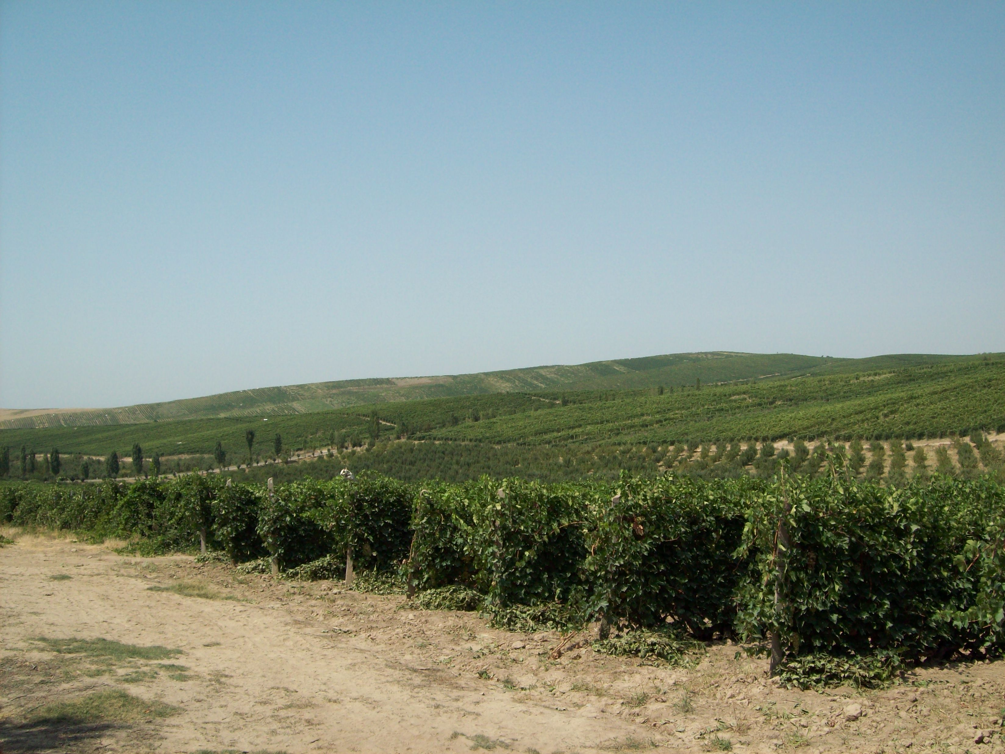 Виноградники Паркентского района Ташкентской области.